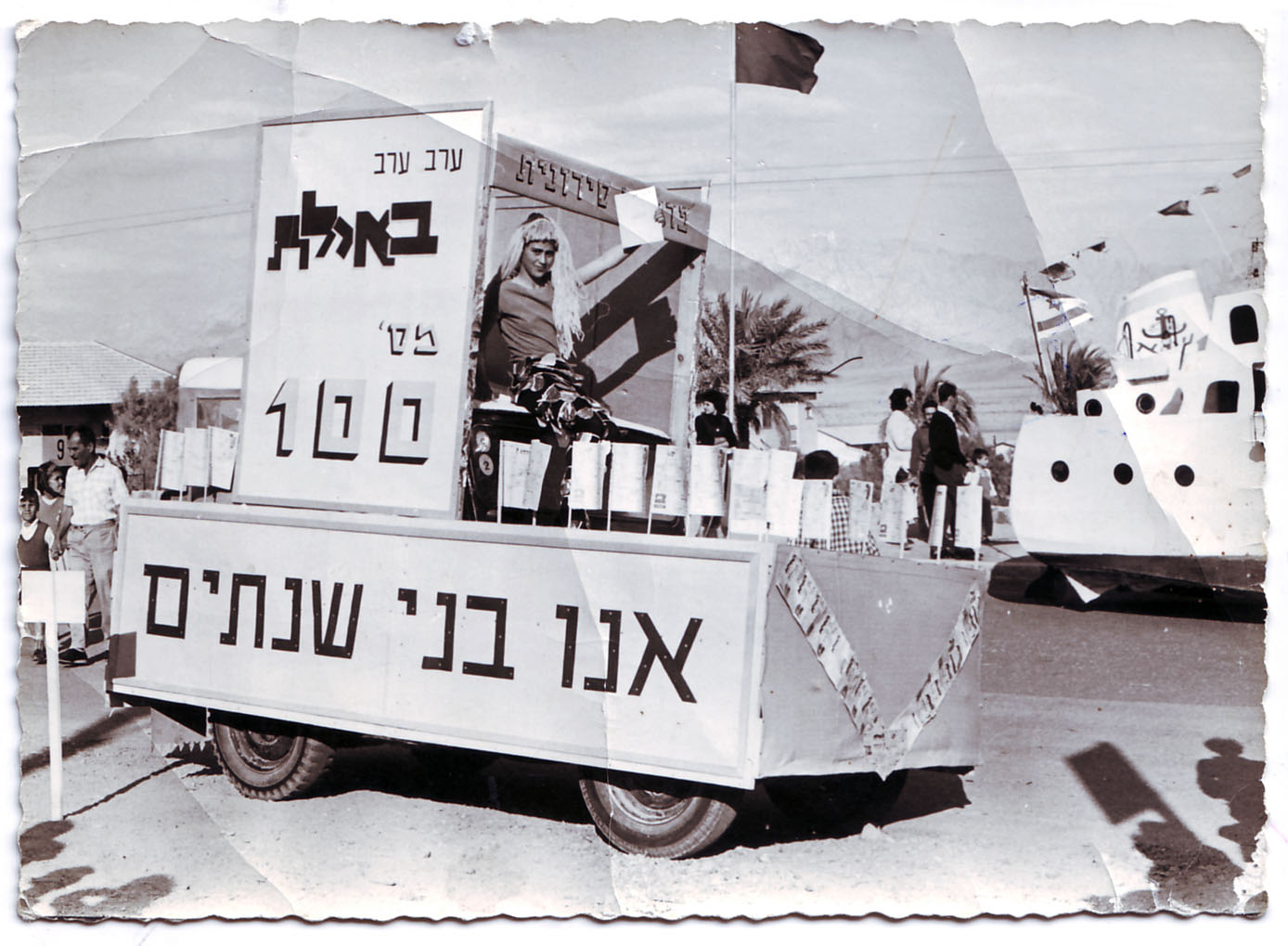 עדלאידע, אילת 1964, המשאית של ערב ערב באילת